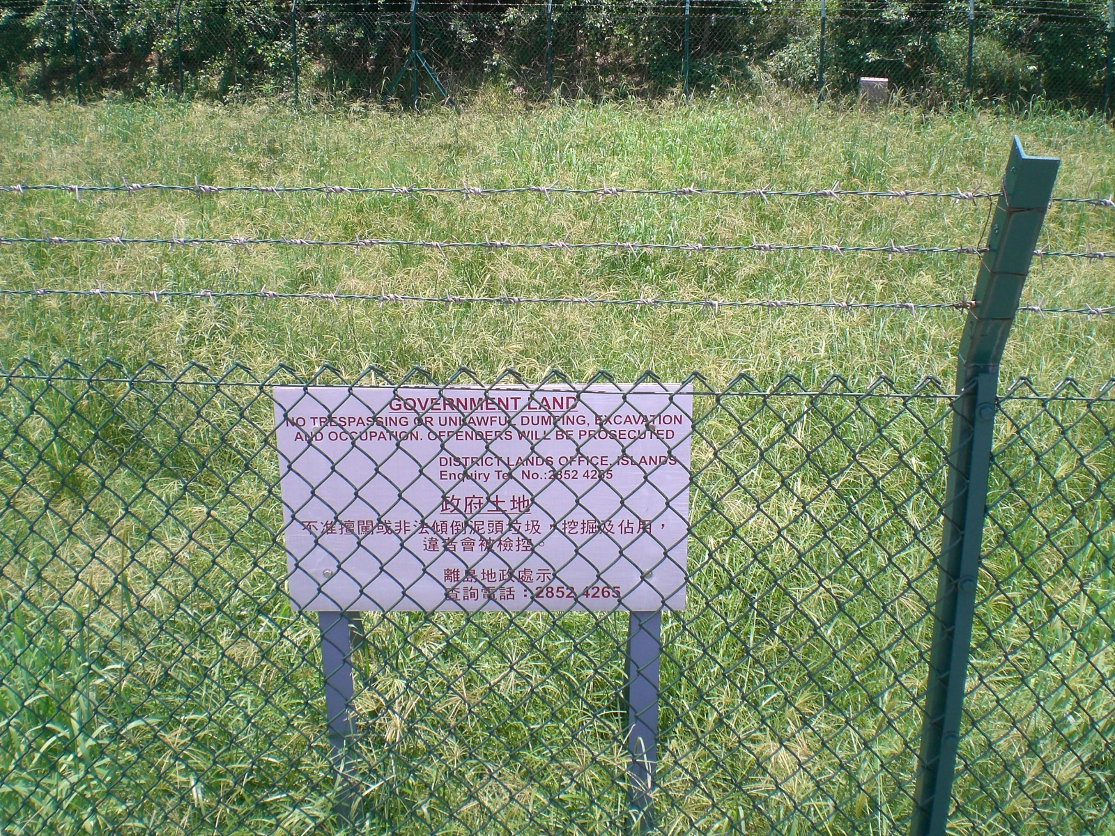 Maschendraht-Zaun mit Stacheldraht-Übersteigschutz in Hong Kong.